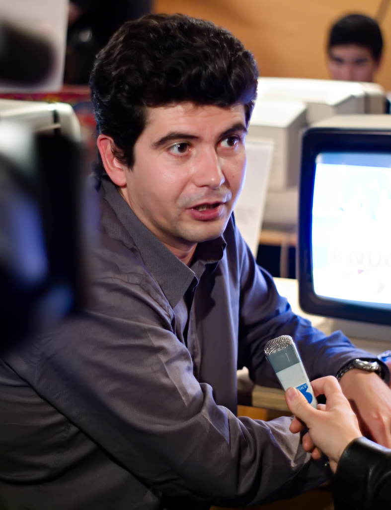 Frédérick Raynal au Festival du jeu vidéo de Montreuil en 2007, donnant un entretien à des journalistes de France 3